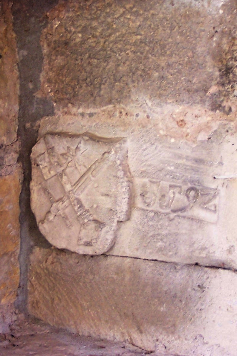 Versetzter Wappenstein an der Südfassade - Schlüssel und Schwert weisen das Wappen dem Erfurter Peterskloster zu.